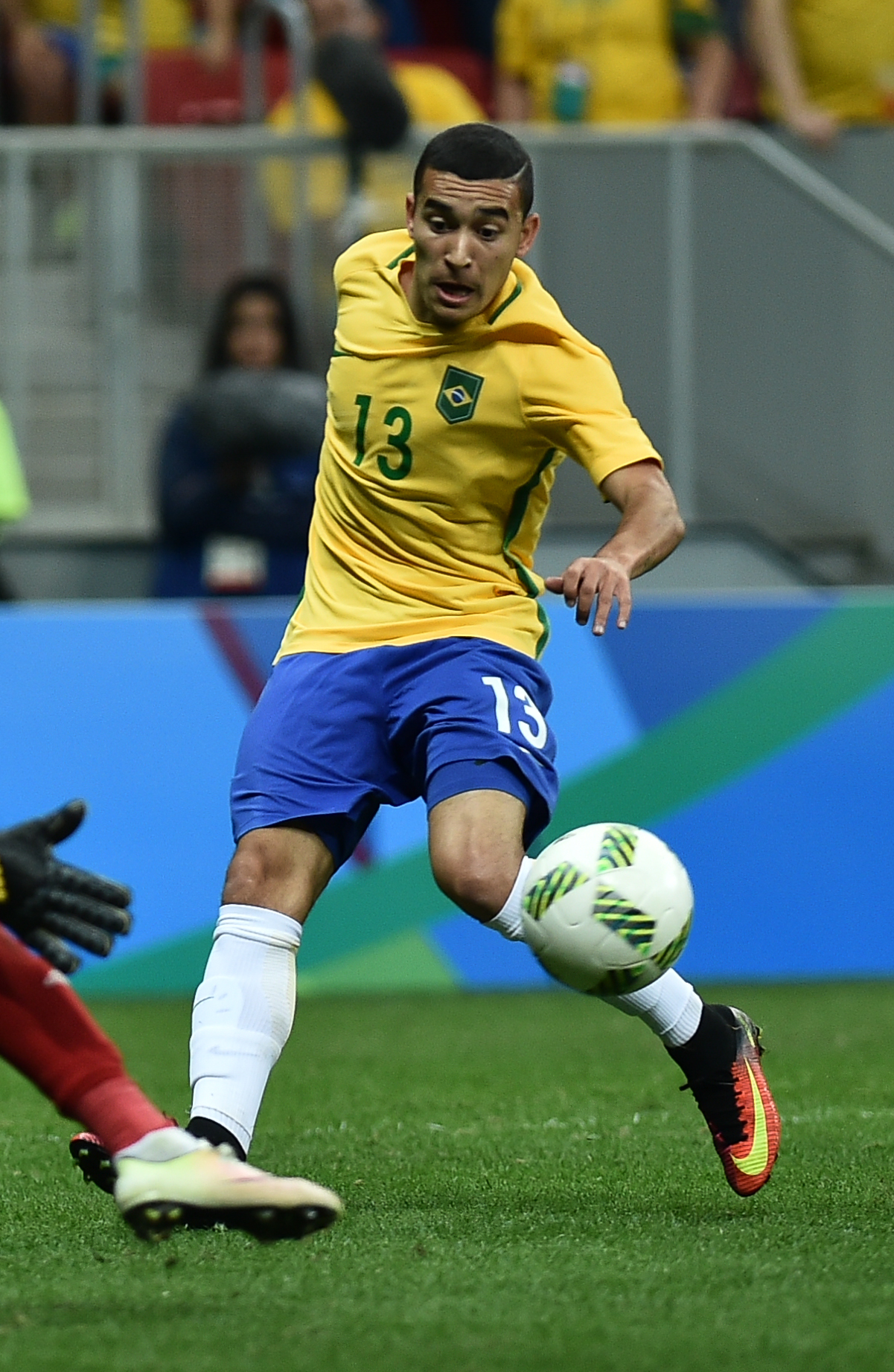 Estádio Nacional de Brasília Mané Garrincha, Brasília, DF, Brasil, 7/8/2016 Foto: Andre Borges/Agência Brasília. Brasil e Iraque jogam neste domingo (7), no Estádio Mané Garrincha, pelo grupo A do futebol masculino nas Olimpíadas 2016.